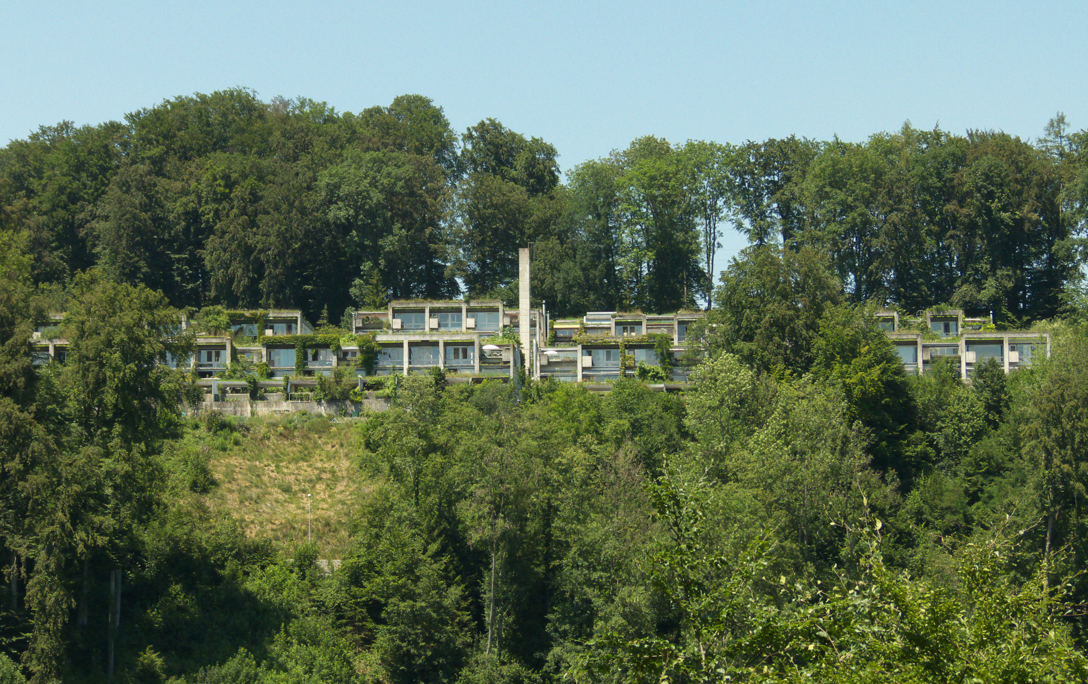 Halensiedlung, Südseite